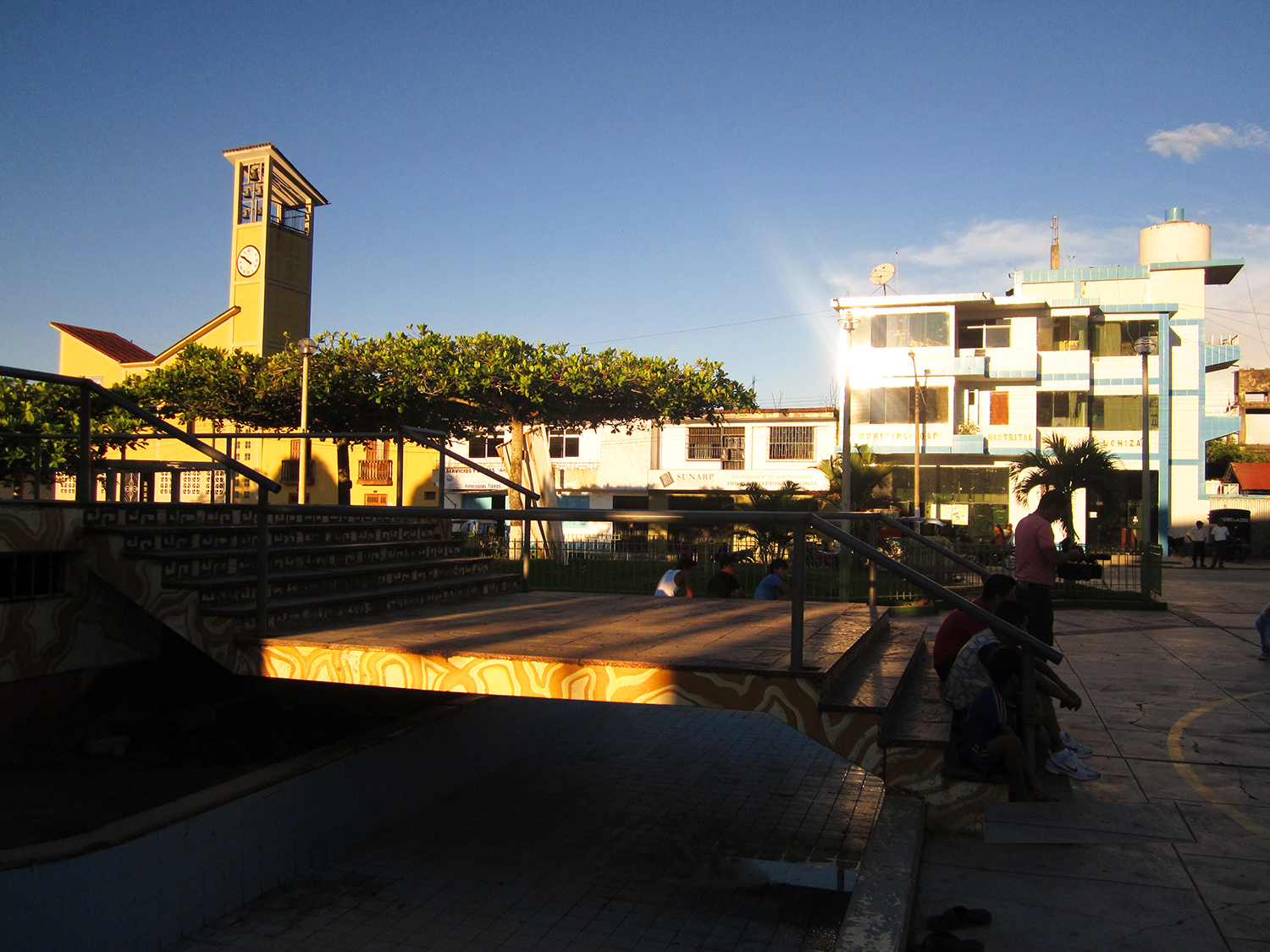 VISTA PANORÁMICA DE LA PLAZA CON EL FONDO DE LA IGLESIA CATÓLICA Y LA MUNICIPALIDAD